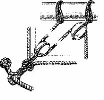 гитов - элемент такелажа